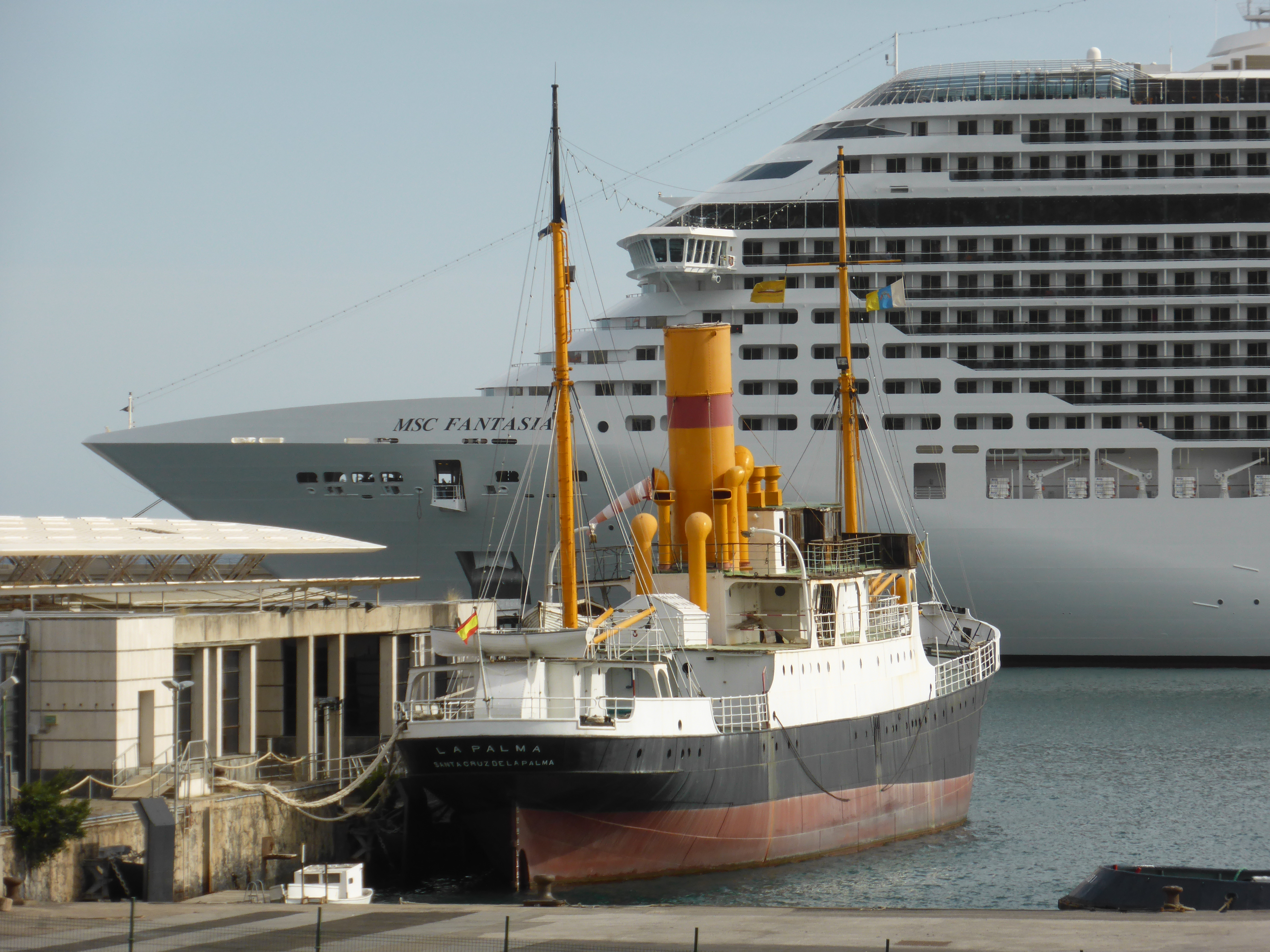 En el pequeño muelle Norte, del puerto de Santa Cruz de Tenerife, se encuentra atracado permanentemente el antiguo vapor "La Palma", del año 1912, uno de los correíllos que efectuaban viajes interinsulares en las Islas Canarias. Al fondo vemos la sección de proa del gigantesco buque de cruceros "MSC Fantasia", matriculado en Panamá (con bandera de conveniencia de Panamá, pero armador europeo: "MSC Crociere"), que entró en servicio en diciembre de 2008. En la fotografía se aprecia la diferencia de tamaños entre el pequeño vapor y un moderno buque de cruceros para turistas.